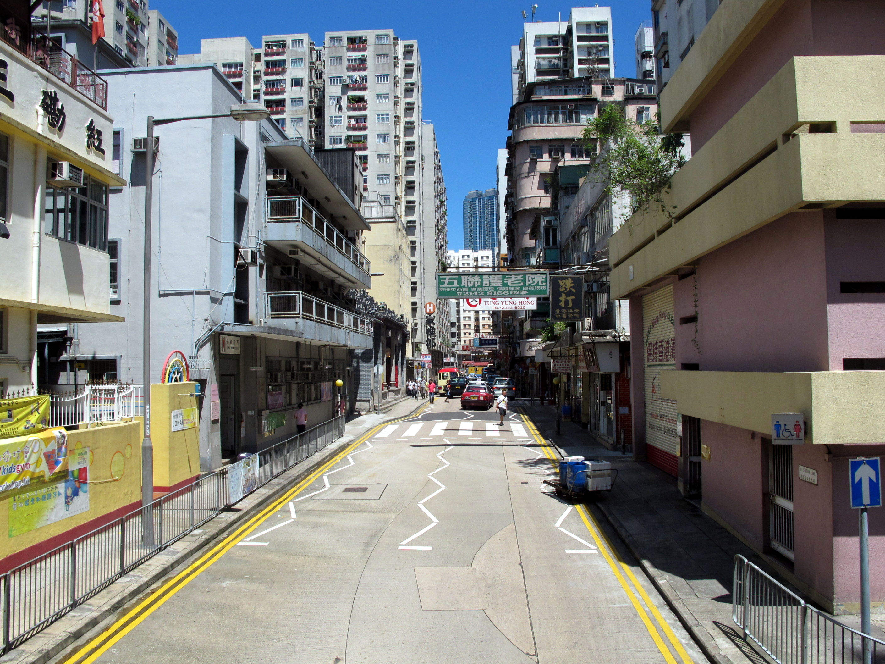 Hung Hom Station Lane 紅磡 差館里